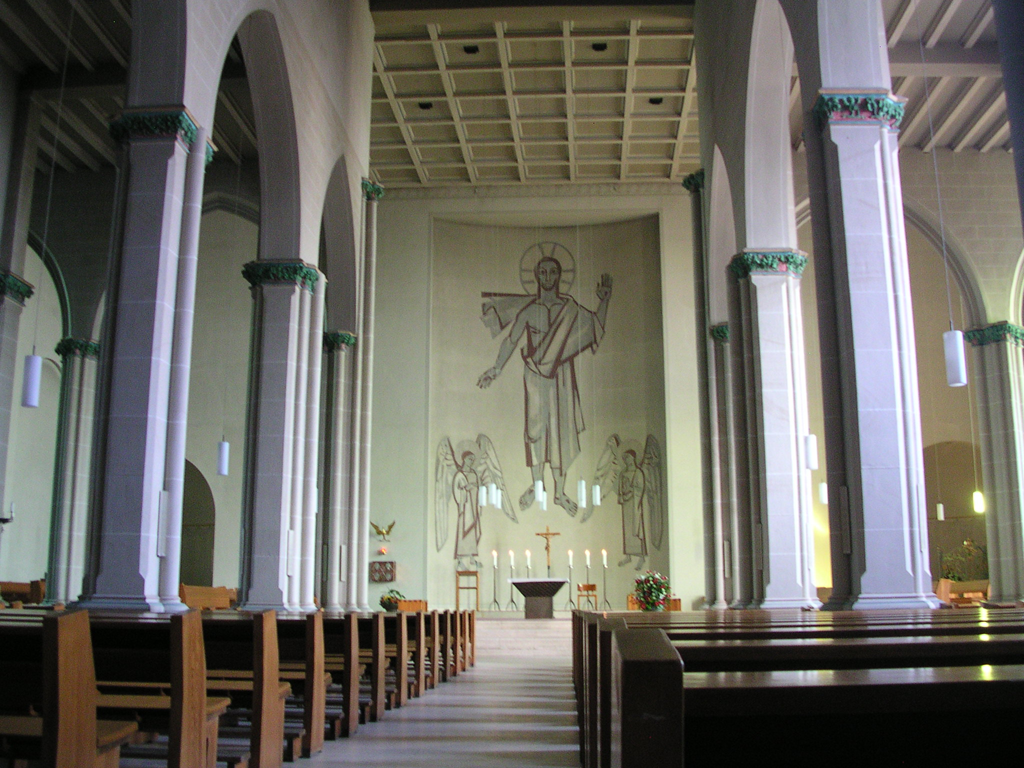 Eschweiler, römisch-katholische Pfarrkirche Peter und Paul